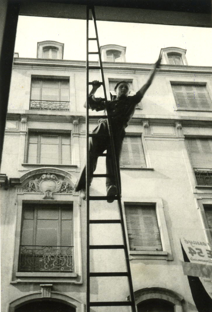 Laveur de vitres à Strasbourg (Bas-Rhin, France).